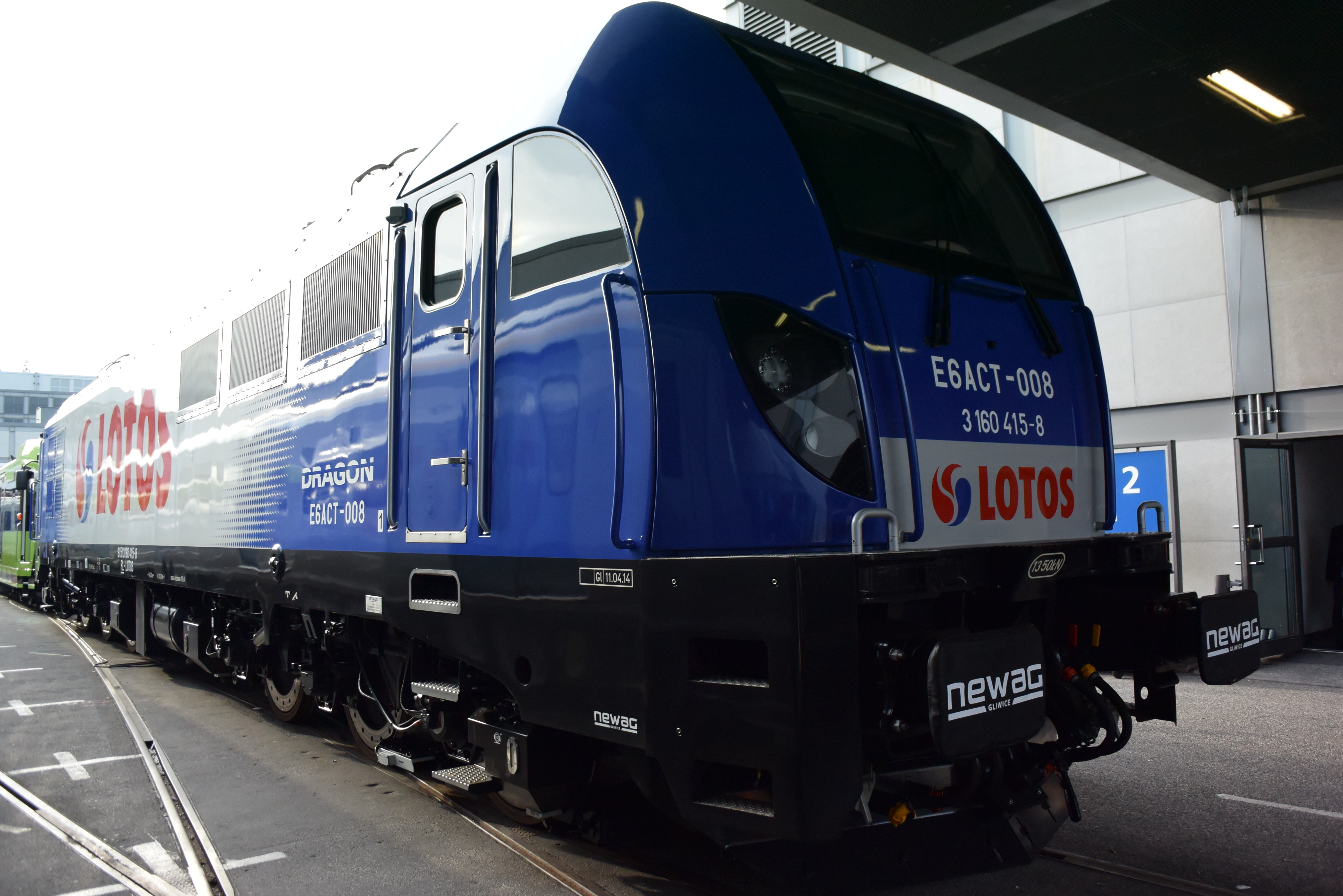 Newag Dragon podczas InnoTrans 2014